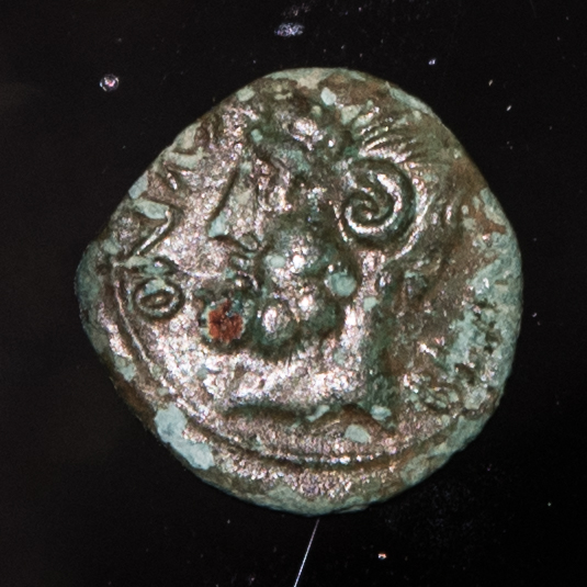 Monnaie de Cunobelinos (type Cunobelinos), bronze 2,43 g diam. 14 mm. Avers : tête romanisée avec les attributs de Jupiter Ammon, marque CVN [OBE] LIN Trouvée à Gosbecks, Colchester en 1994-1995, conservé au Colchester and Ipswich museums, inv COLEM 1997.28.2 Claude, un empereur au destin singulier - Exposition au musée des Beaux-Arts de Lyon - 2018, catalogue p. 263